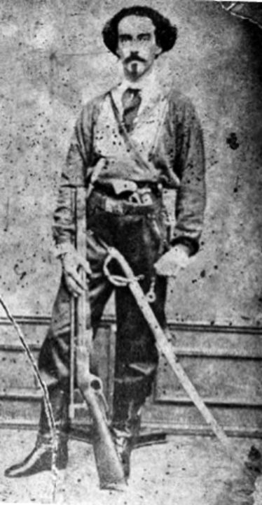 General Venancio Pulgar, caudillo militar del Estado Zulia, Venezuela, a mediados del siglo XIX.